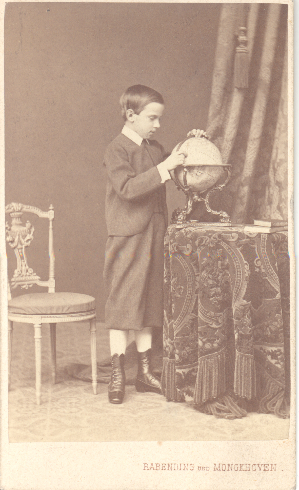 Rudolf als Kind, betrachtet einen Globus.jpg